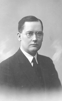 Mart Järvik, eesti põllumajandusteadlane